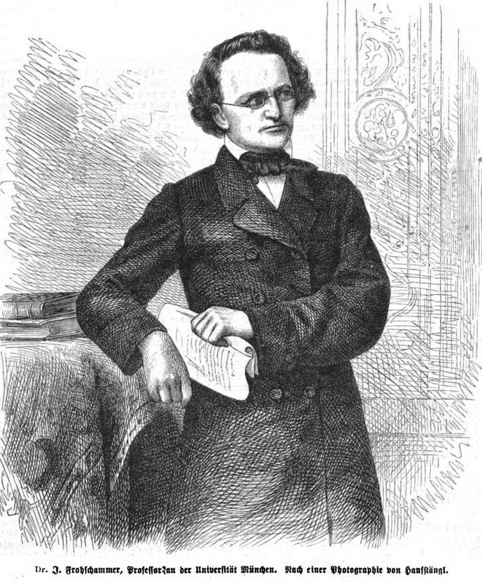 Jakob Frohschammer, deutscher Theologe und Philosoph, 1863.